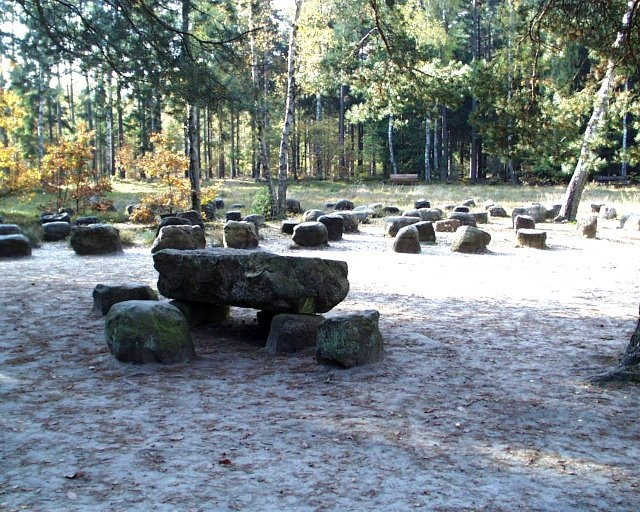 Landtagsplatz Hösseringen - Versammlungsort bis Neuzeit